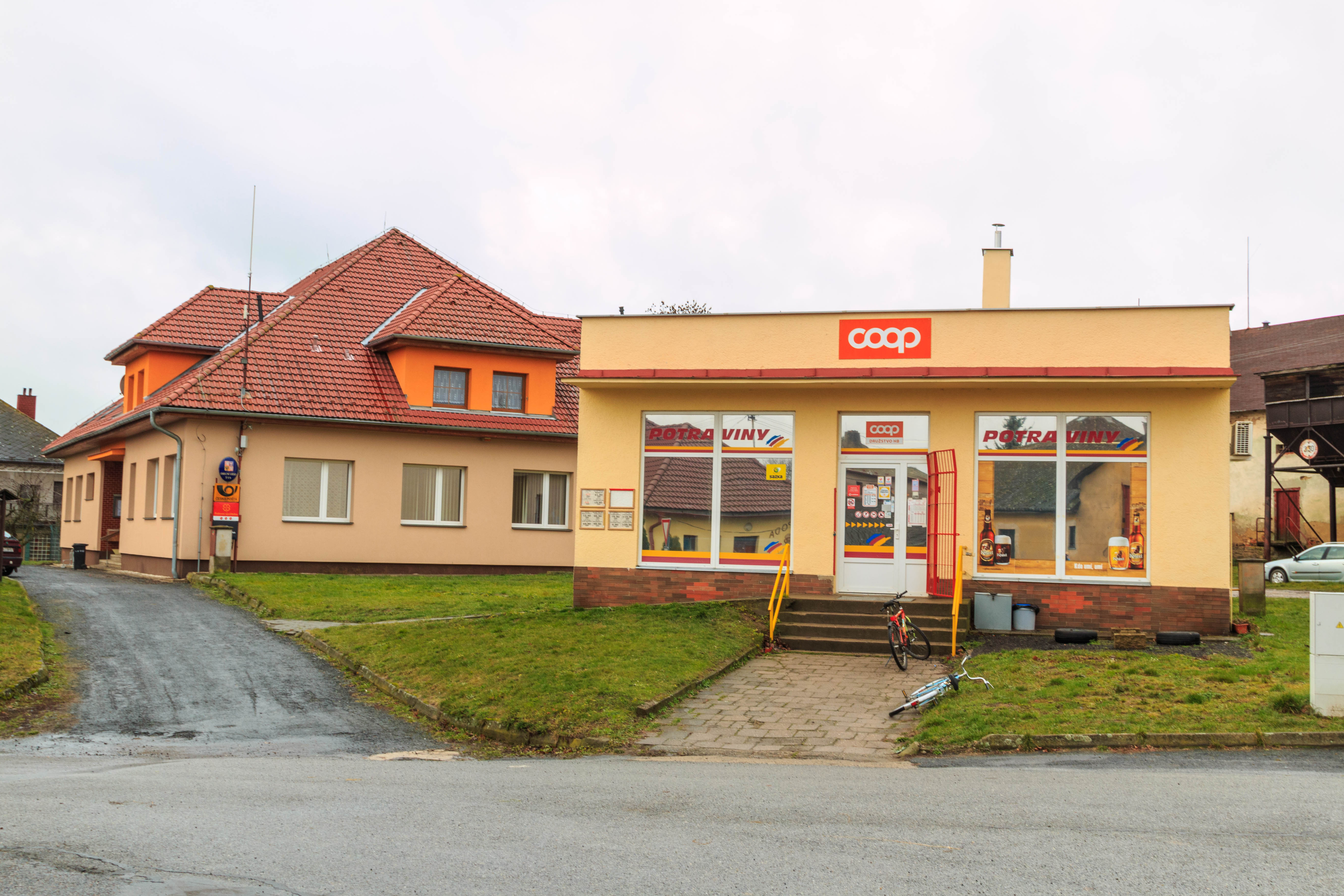 Tis prodejna